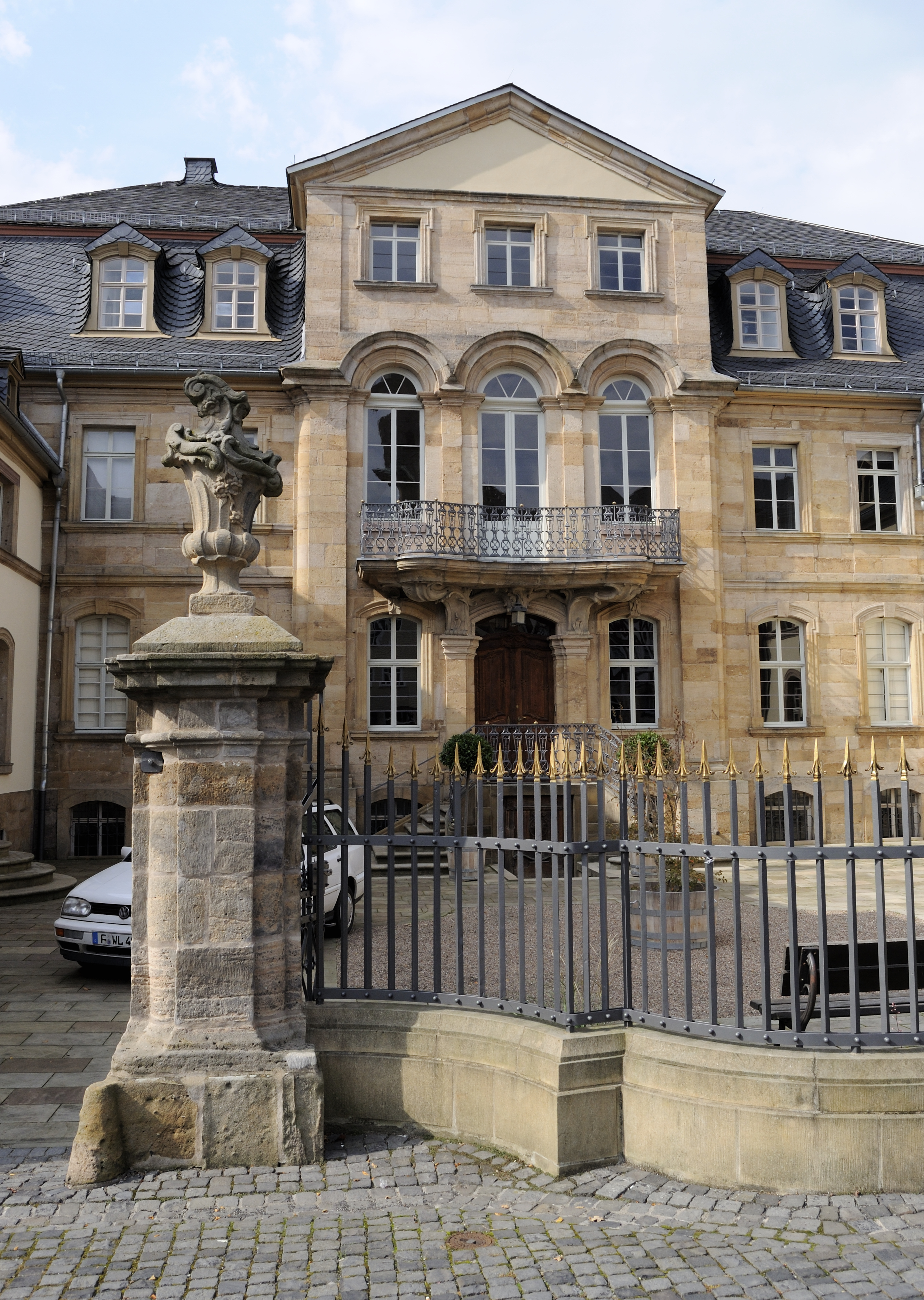 Dieses Foto entstand im Rahmen des Projekts Wiki Loves Monuments Mittelhessen, das aus dem Community-Projektbudget von Wikimedia Deutschland e. V. gefördert wurde.